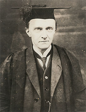 Джордж Анвин (George Unwin) — профессор экономической истории